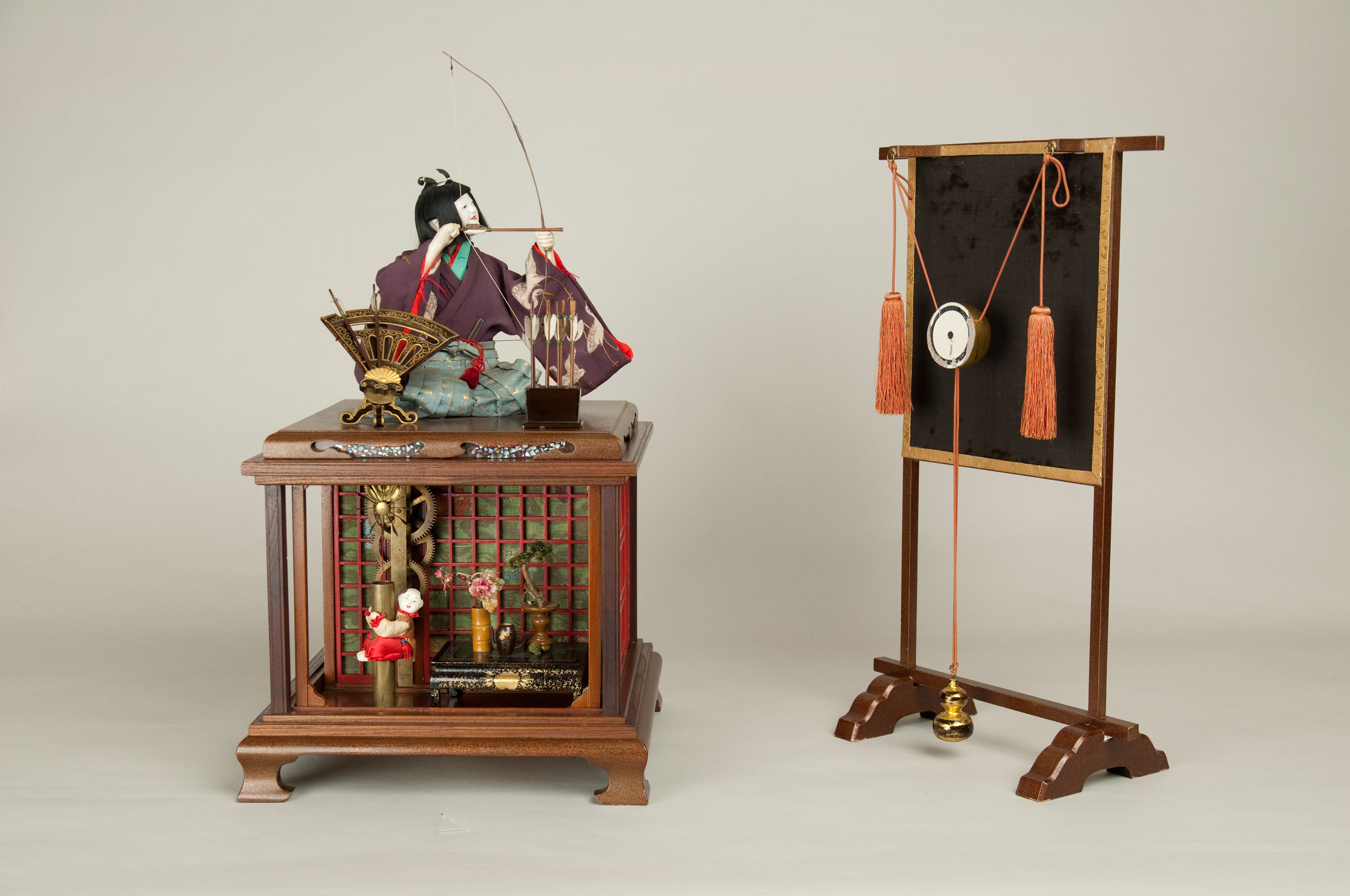 久留米市教育委員会所蔵 大阪寝屋川市の東野進氏より5000万円にて購入 2013/7/18撮影